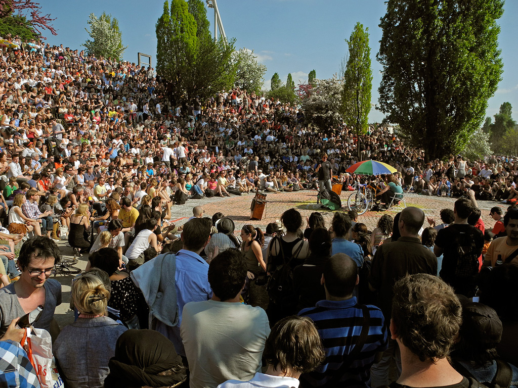 Sonntags im Mauerpark: Joe Hatchiban's Bearpit Karaoke füllt das Amphitheater